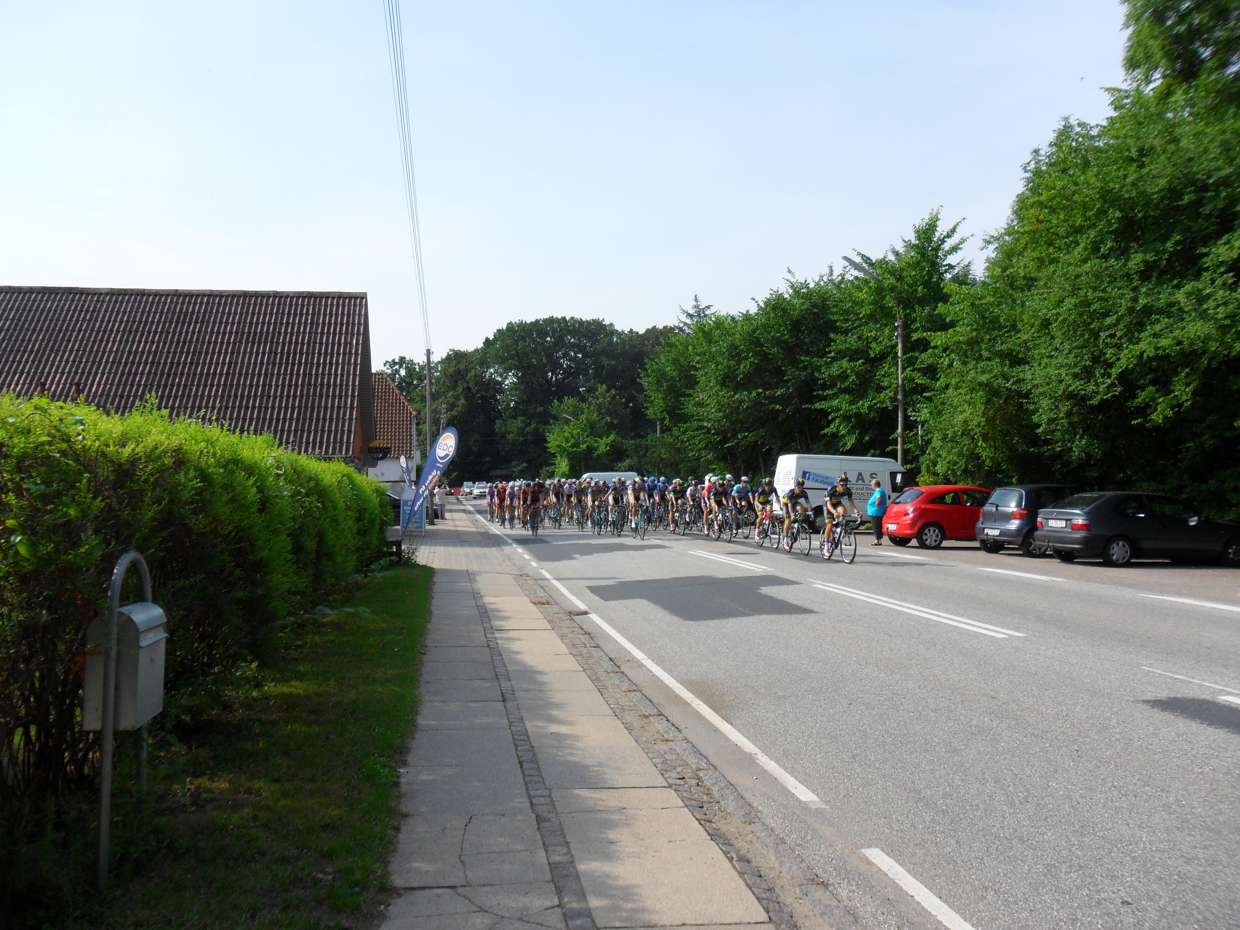 Lørdag 3. august 2013: 4. etape: Rute: Høng, Tissø, Jyderup, Havnsø, Veddinge Bakker, Høve, Asnæs Indelukke, 105 km. Sted: Sølystvej i Jyderup